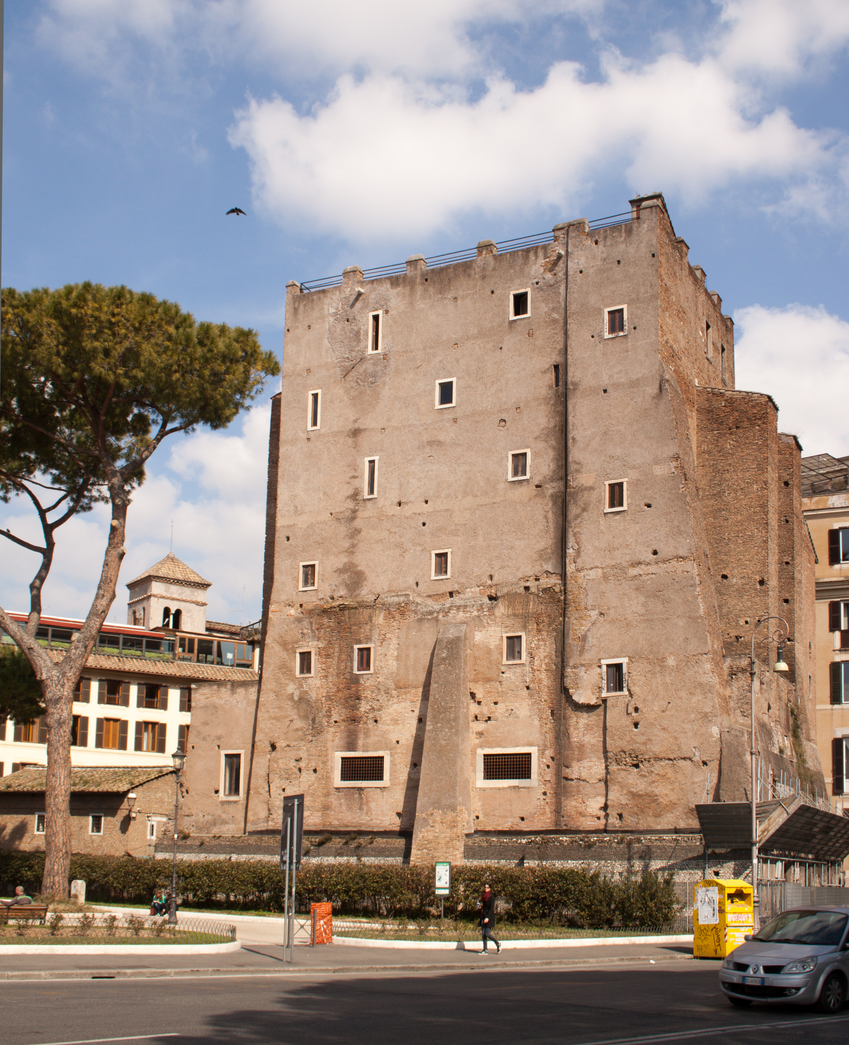 Imperial Forums in Rome